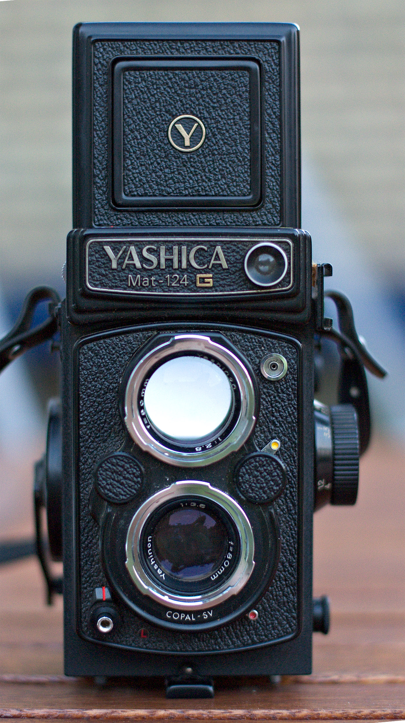 Deze foto is gemaakt met als doel om deze onder de vermelde licenties te publiceren op Wikipedia. Uploader is eigenaar van het bestand.